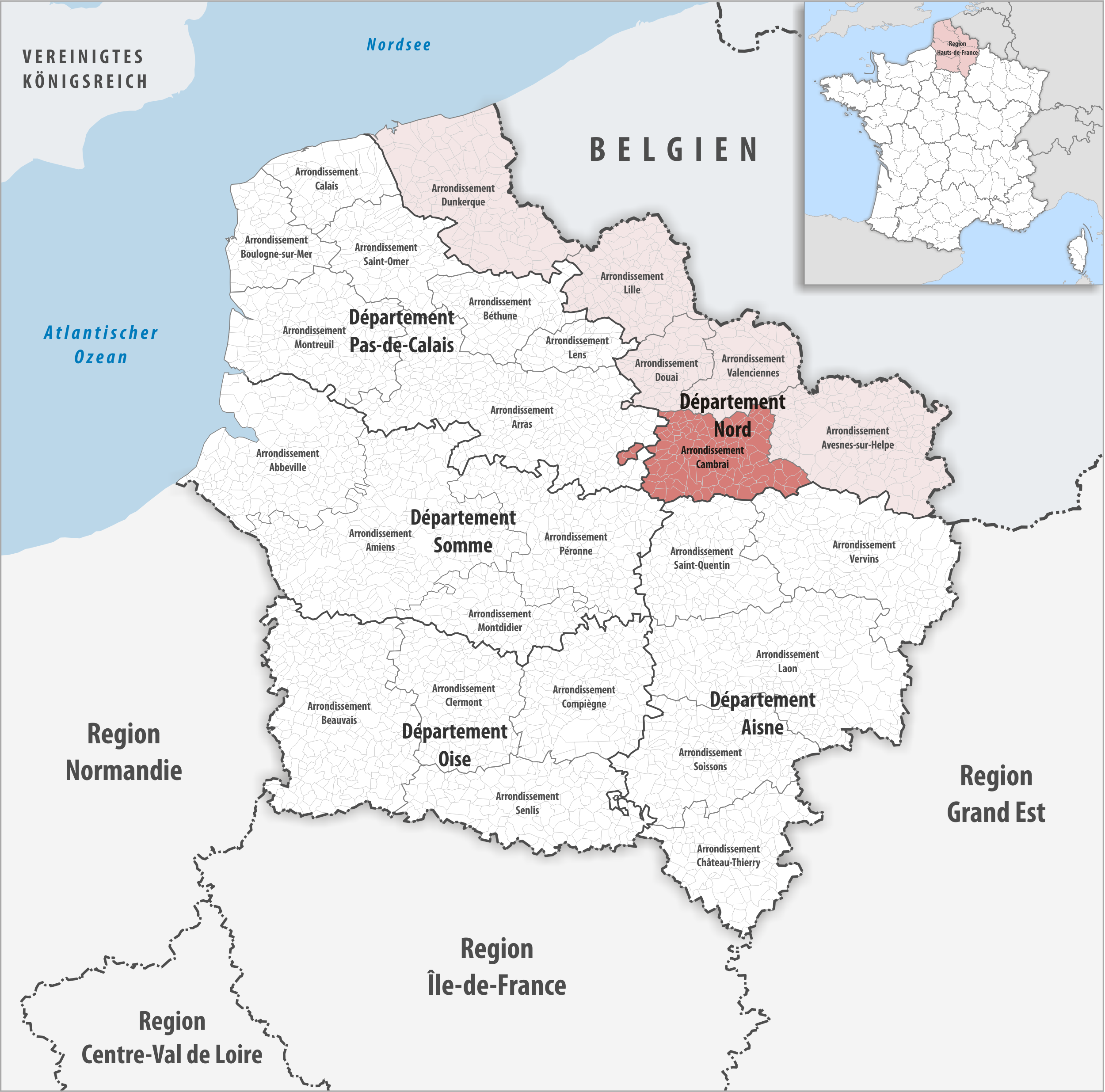 Lage des Arrondissements Cambrai